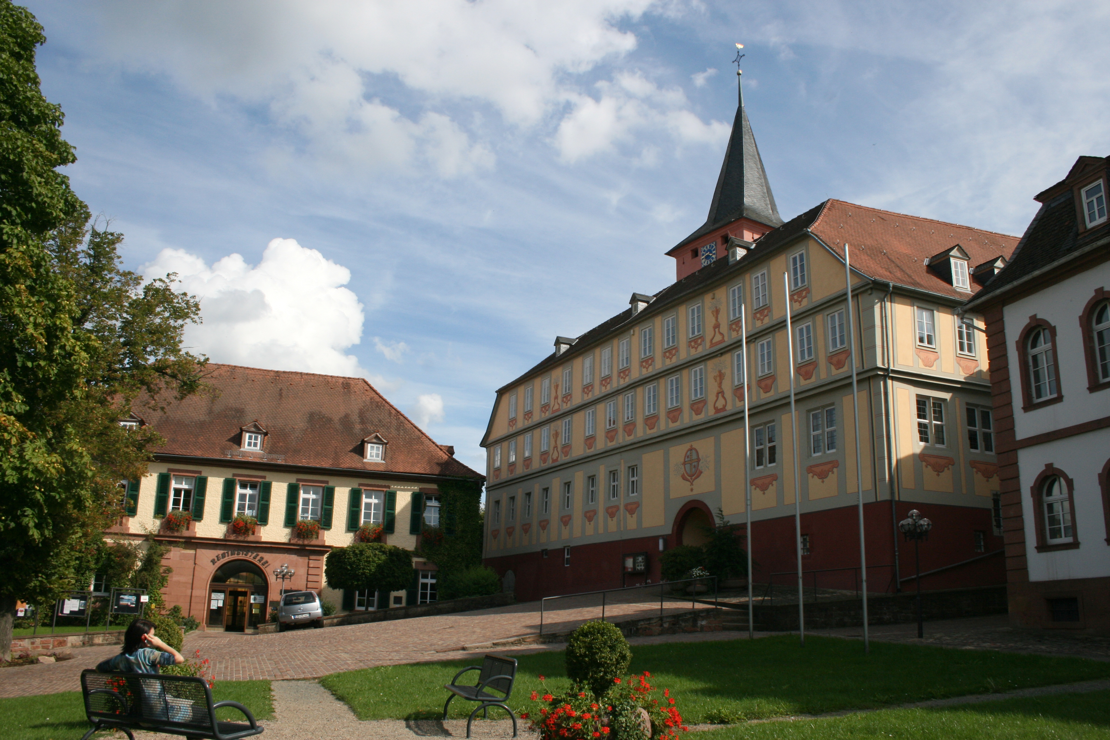 Altes Schloss und Rentschreiberei in Bad König, Odenwaldkreis, Hessen.